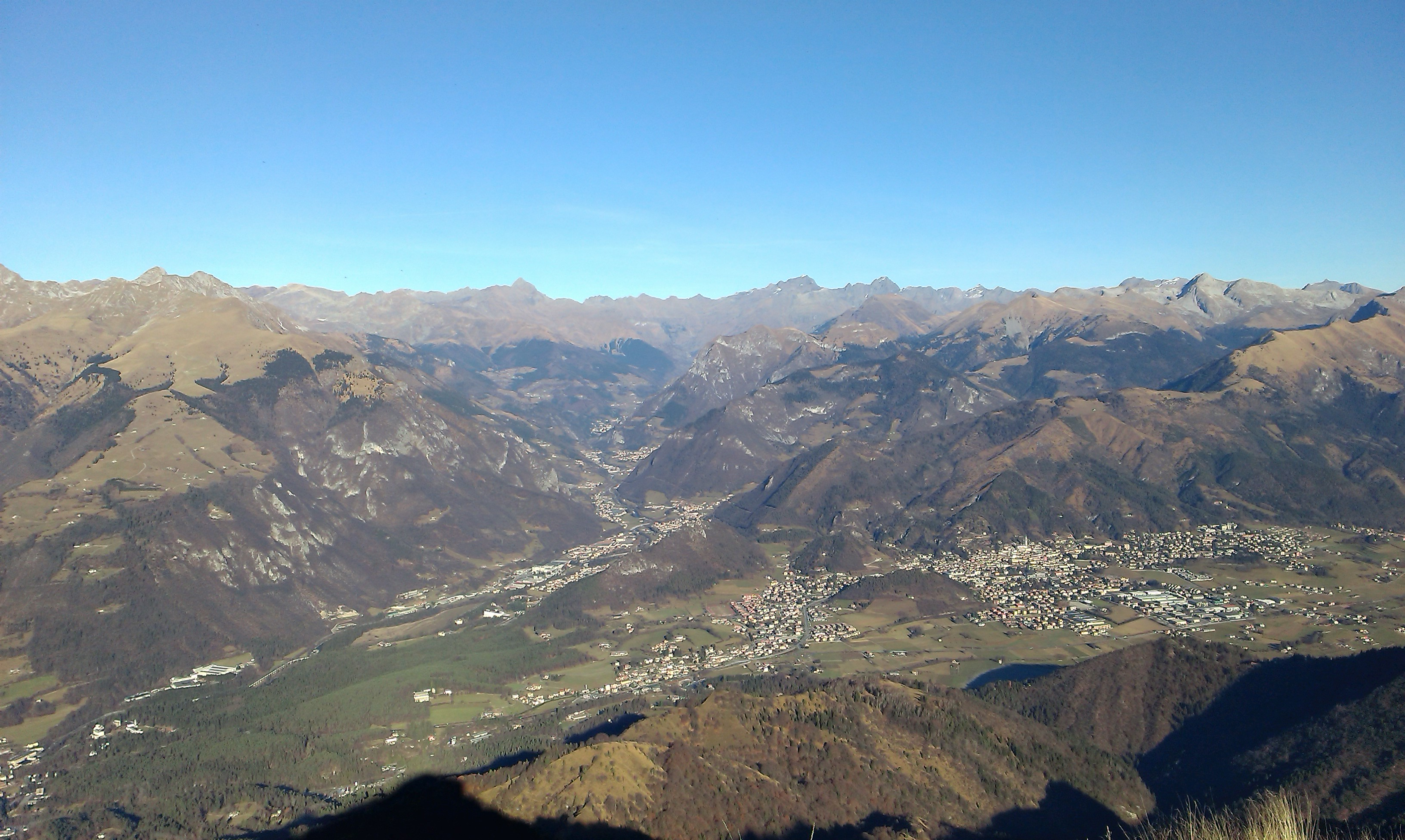 L'alta Valle Seriana con Piario, Villa d'Ogna e Ardesio (a sinistra) e l'altopiano di Clusone (a destra), visti dalla cima del pizzo Formico.